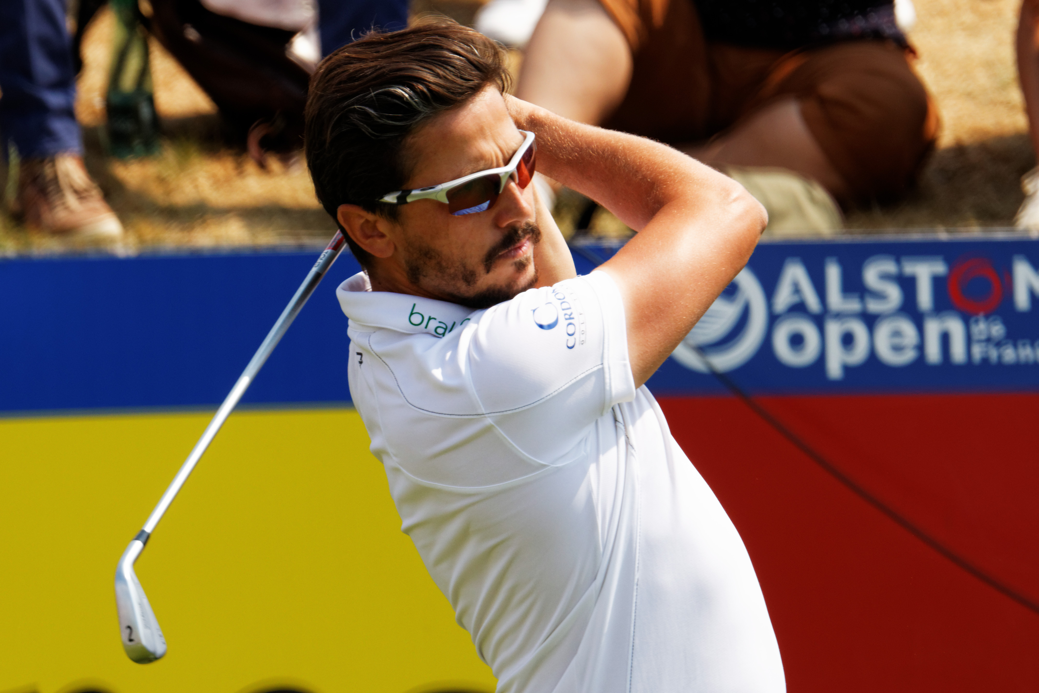 photo prise lors de l'Alstom - Open de France de Golf 2015